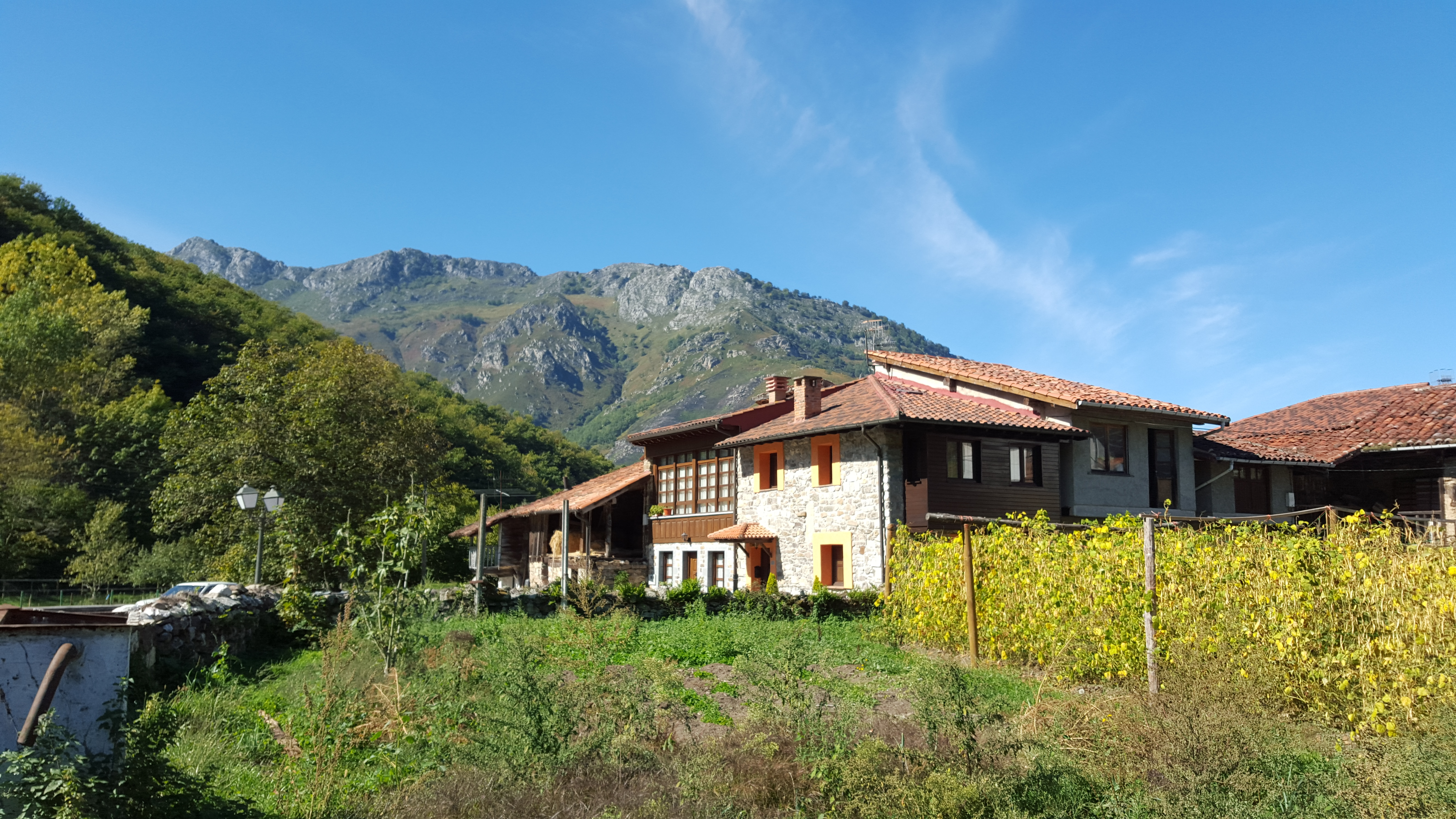 Rioseco, Premio Príncipe de Asturias Pueblo Ejemplar 2009